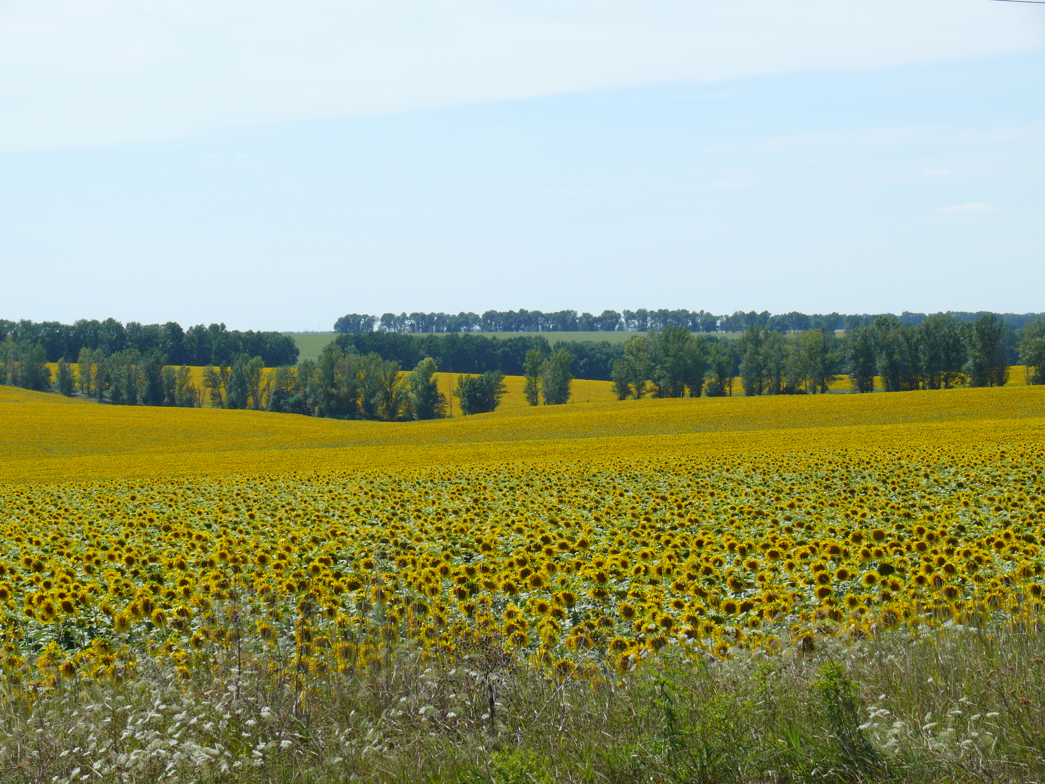 Высокополье. Фермерские угодья.